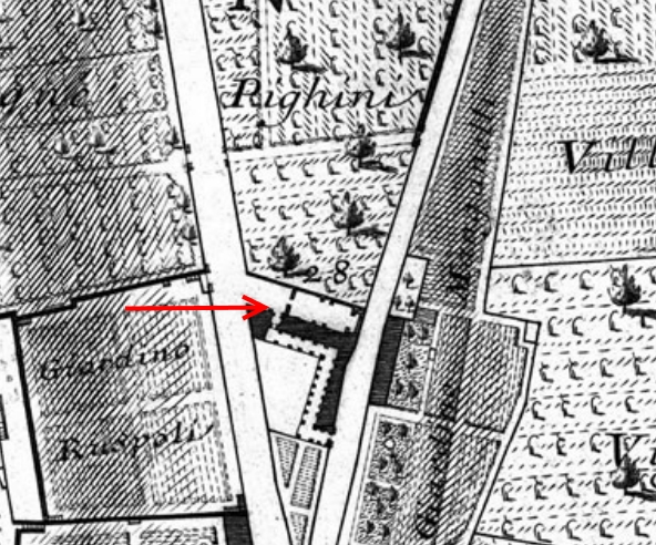 Pianta di Nolli